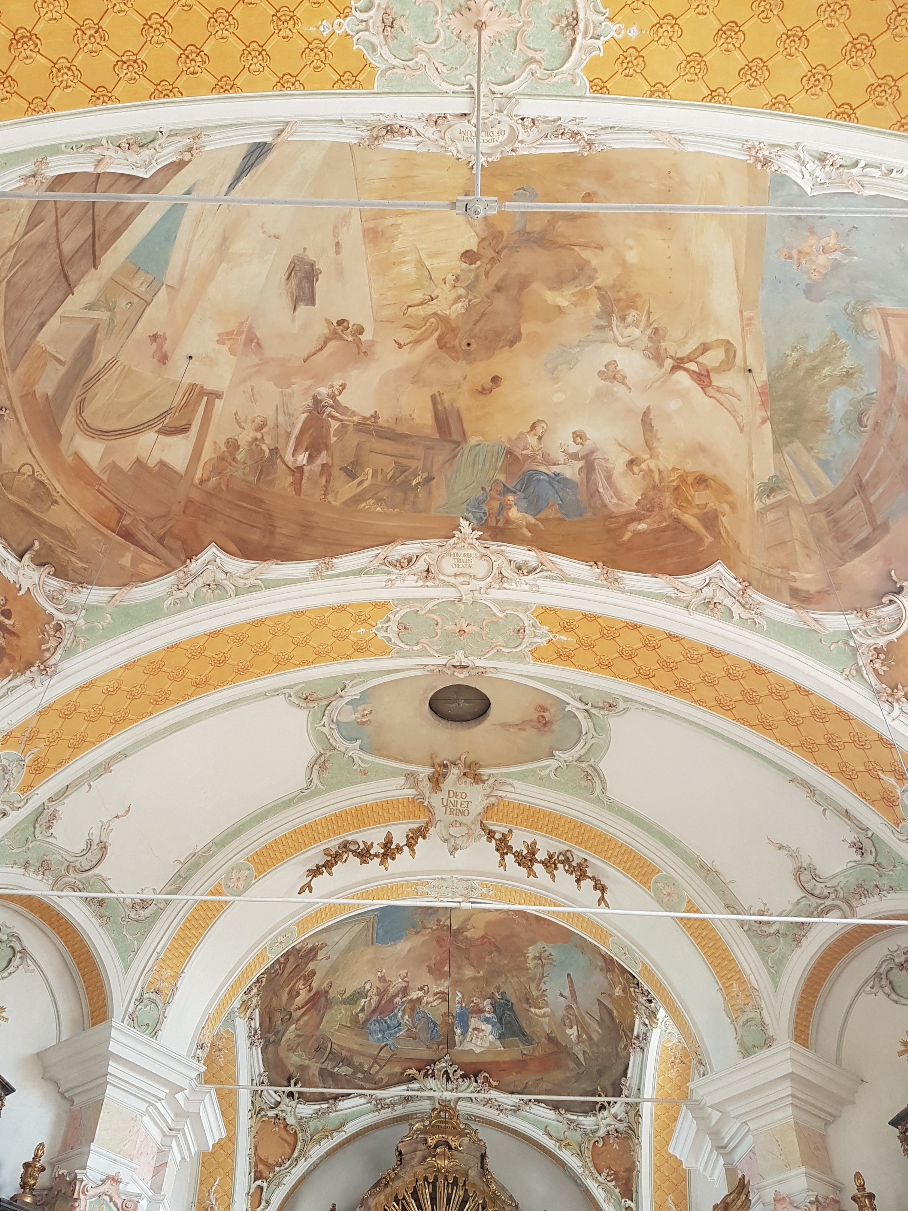 Starnberg, alte Pfarrkirche St. Josef, Deckengewölbe von Chor und Langhaus.